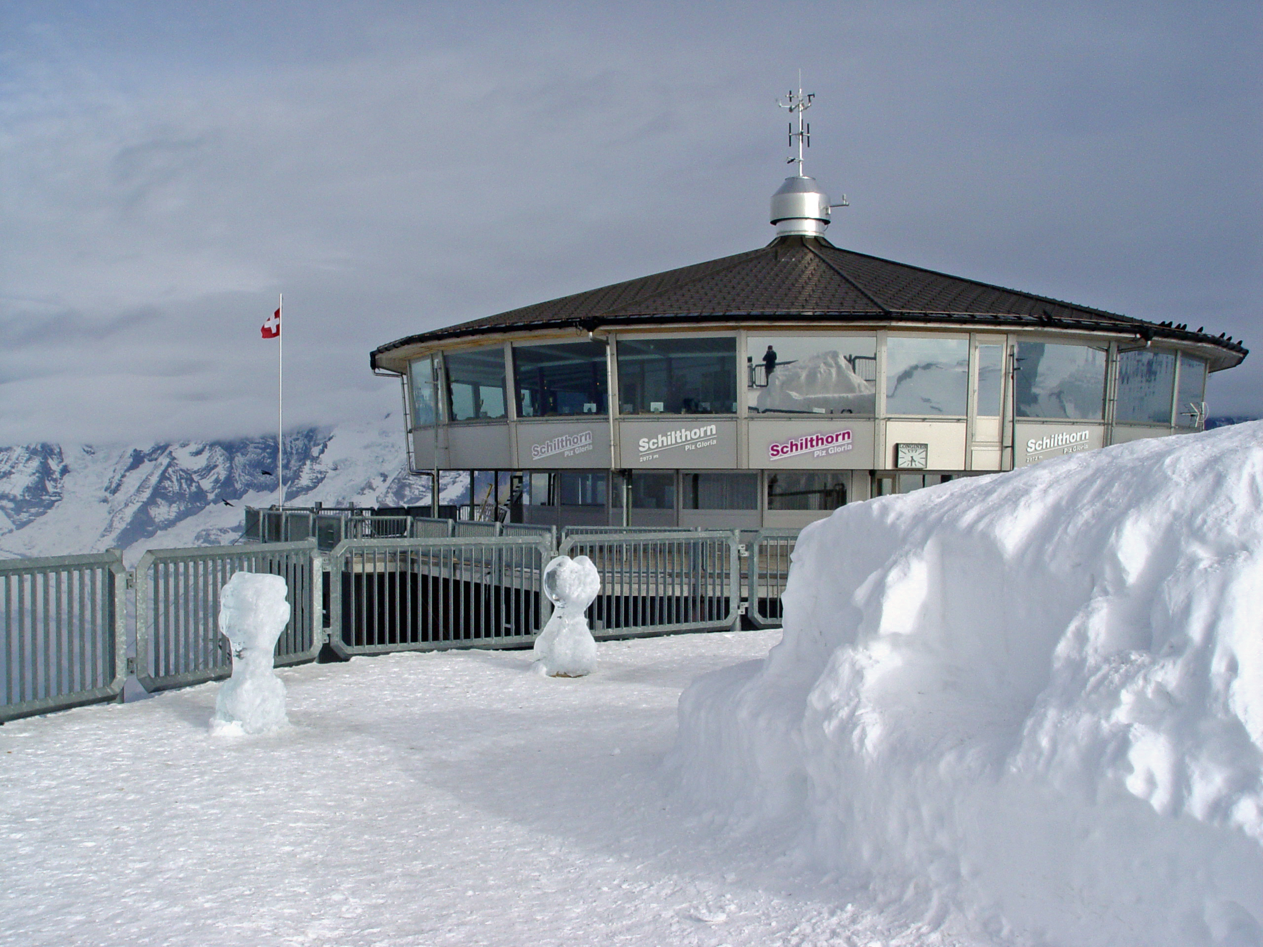 Drehrestaurant Piz Gloria auf dem Schilthorn